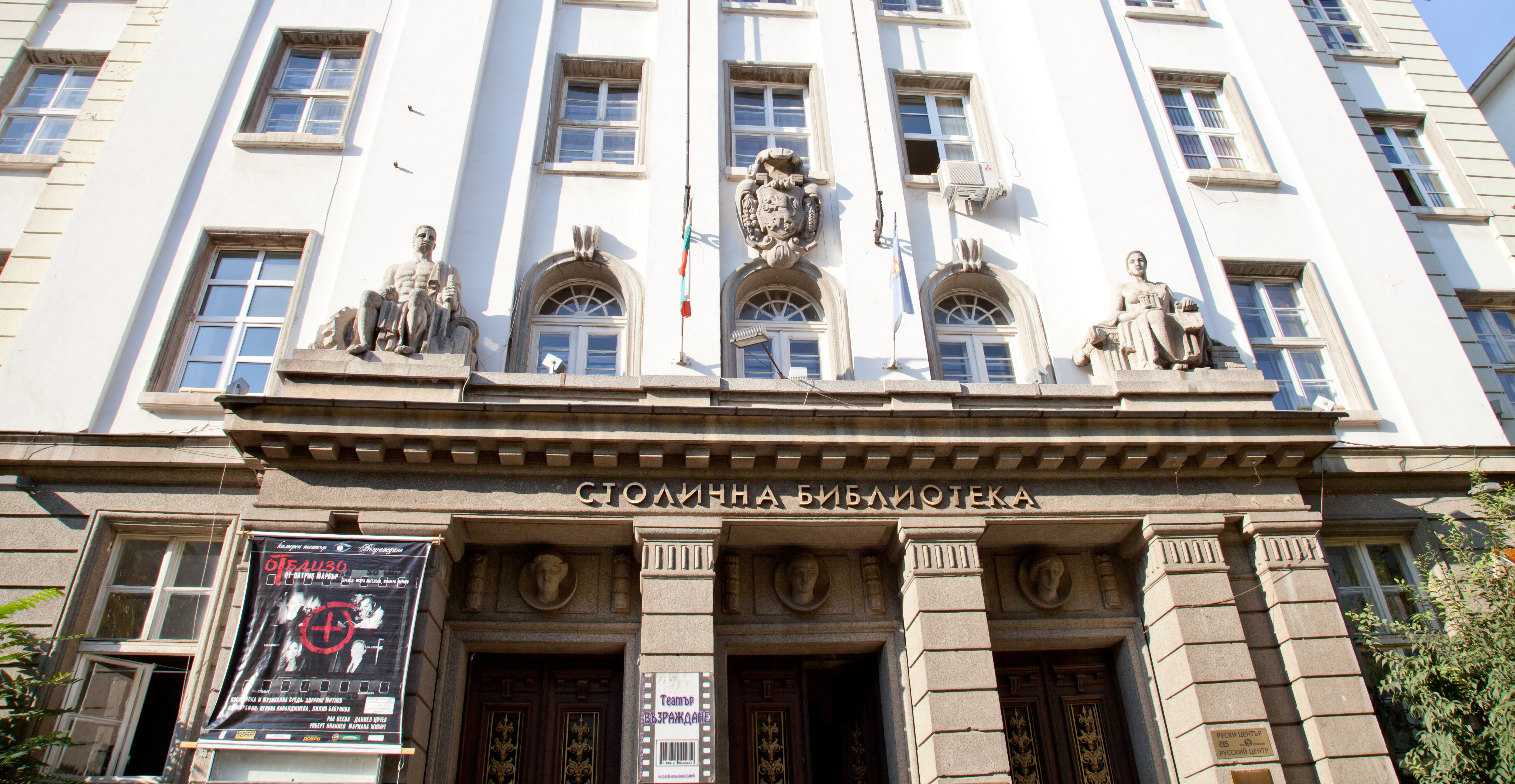 Slaveykow-Platz in Sofia; dort sind täglich (auch im Winter) Buchstände geöffnet), es ist praktisch das größte Buchgeschäft in Sofia; in den umliegenden Häusern haben die Buchstände noch zusätzliche Lager